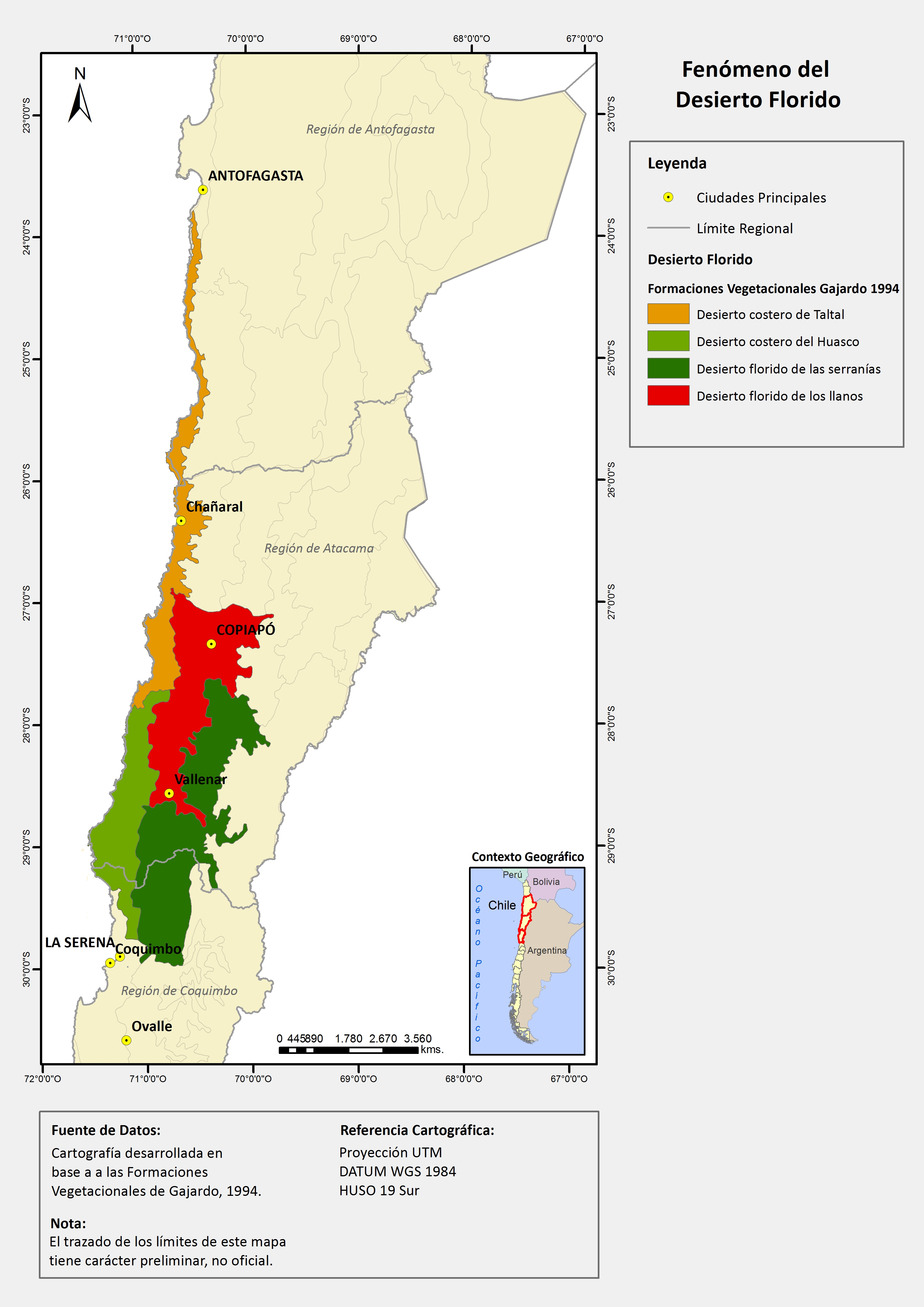 Fenomeno del Desierto Florido, Gajardo 1994